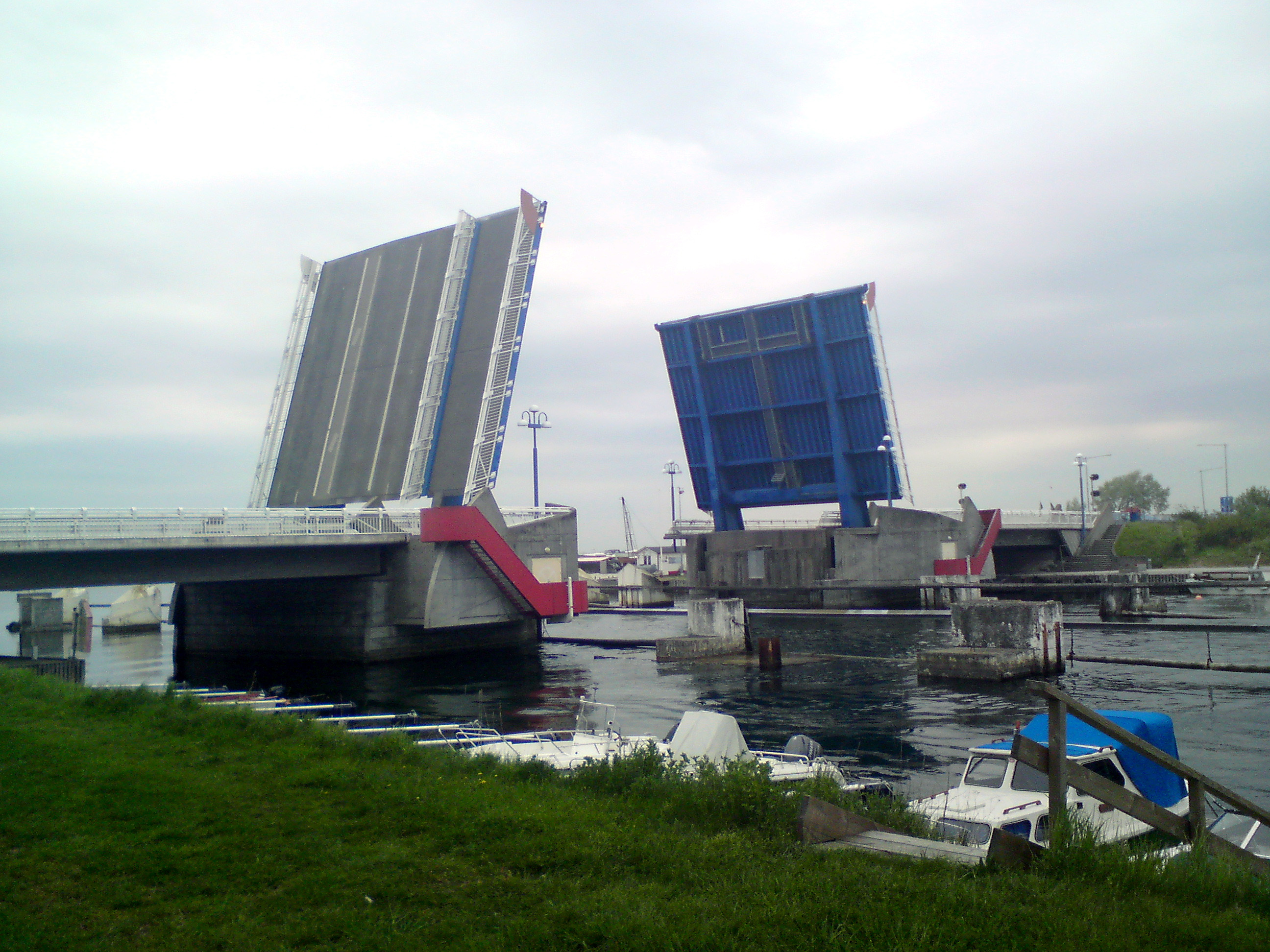 Bron över Falsterbokanalen i öppnat läge